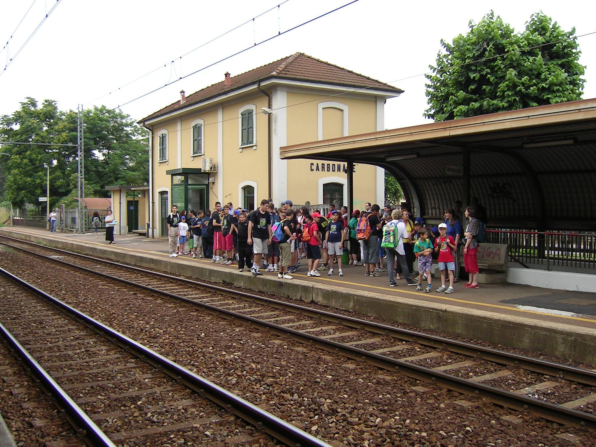 Stazione di Locate Varesino-Carbonate